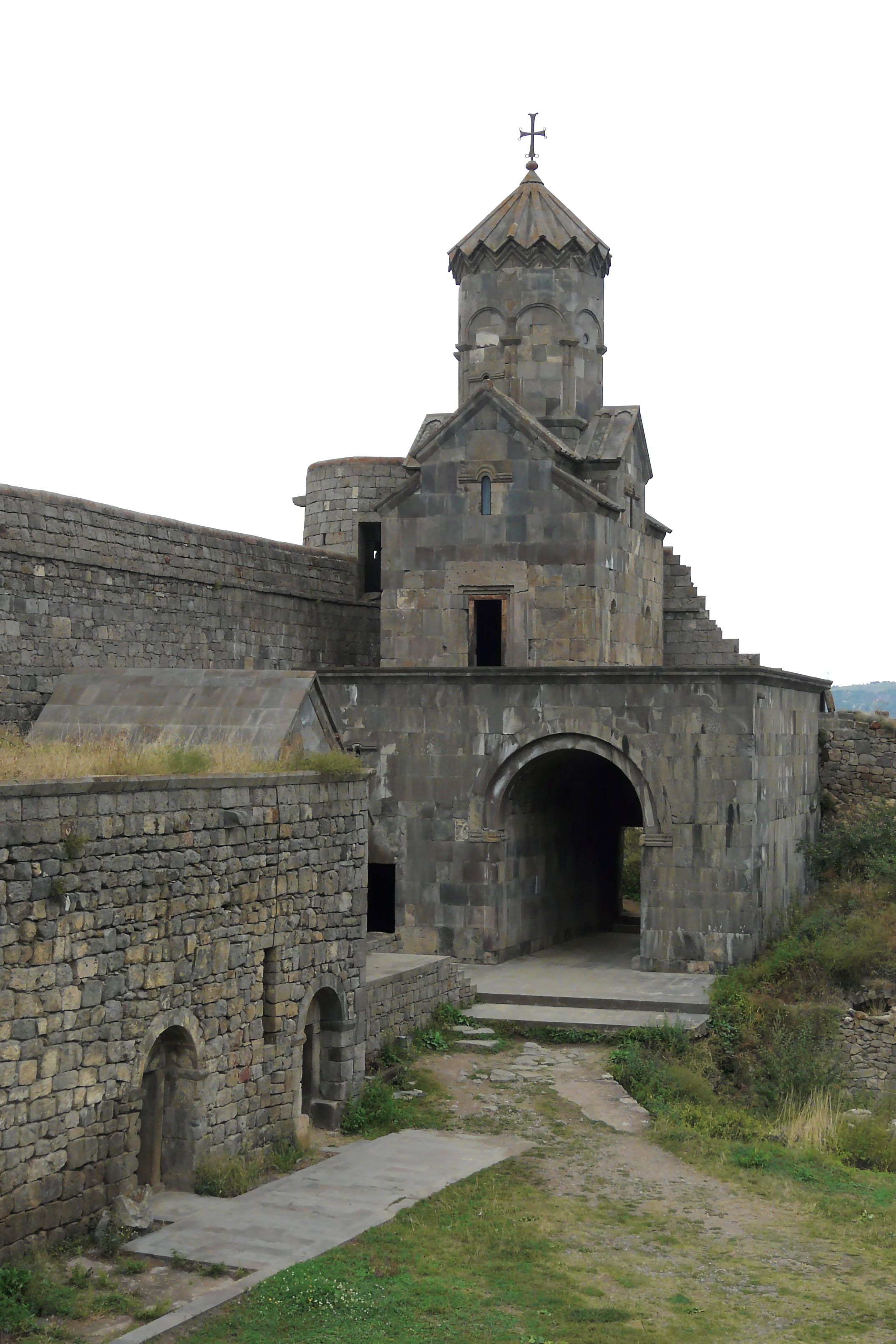 Surp Astvatsatsin, Tatev, Armenia.